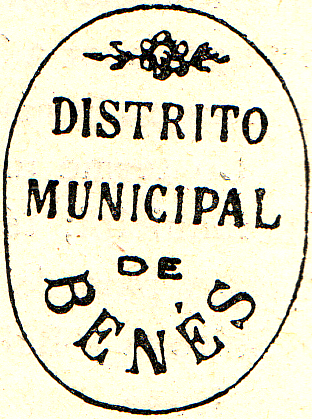 Segell municipal de Benés de vers el 1900 (Sarroca de Bellera, Pallars Jussà)